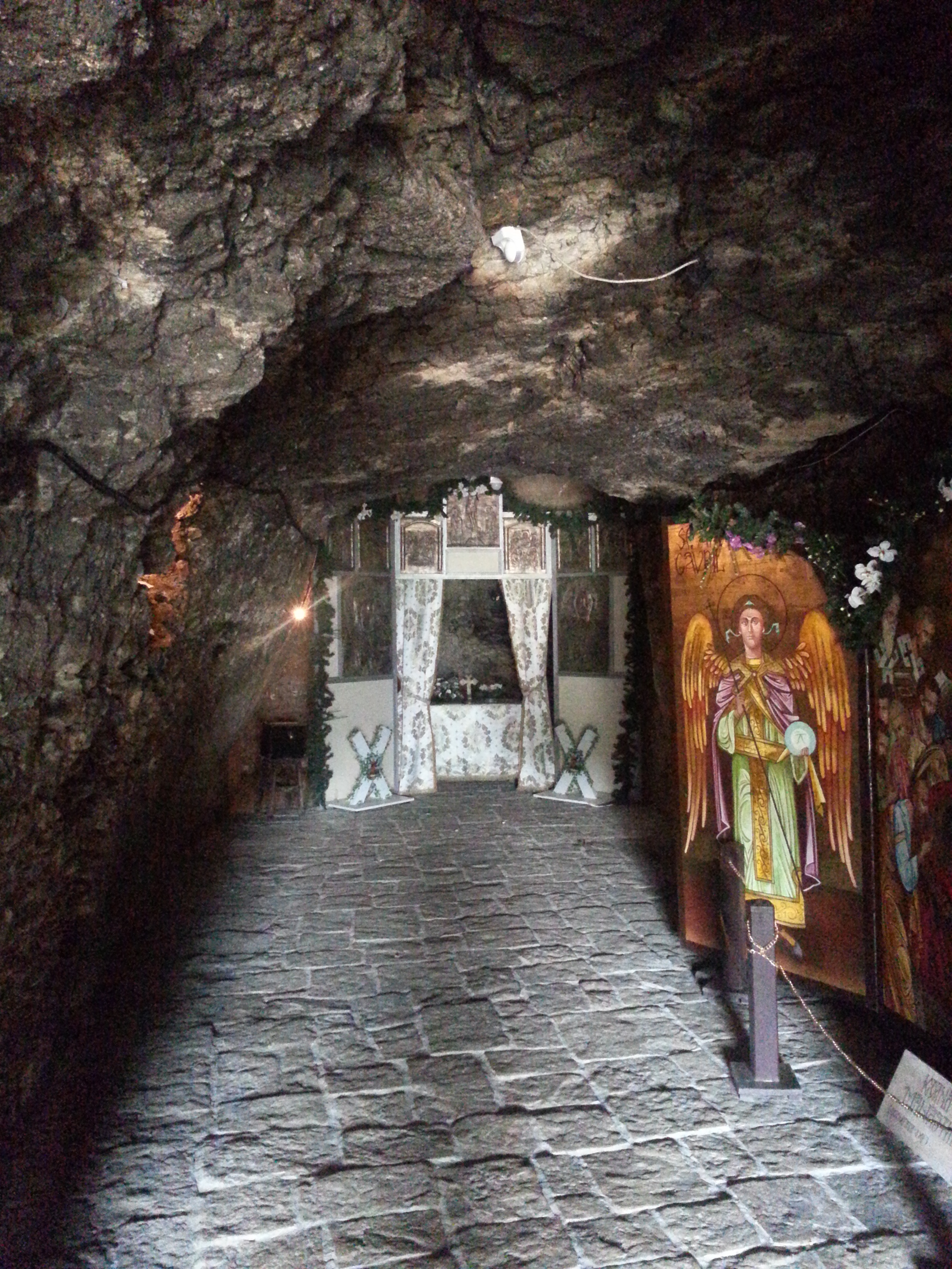 Peșterile „Sf. Apostol Andrei”